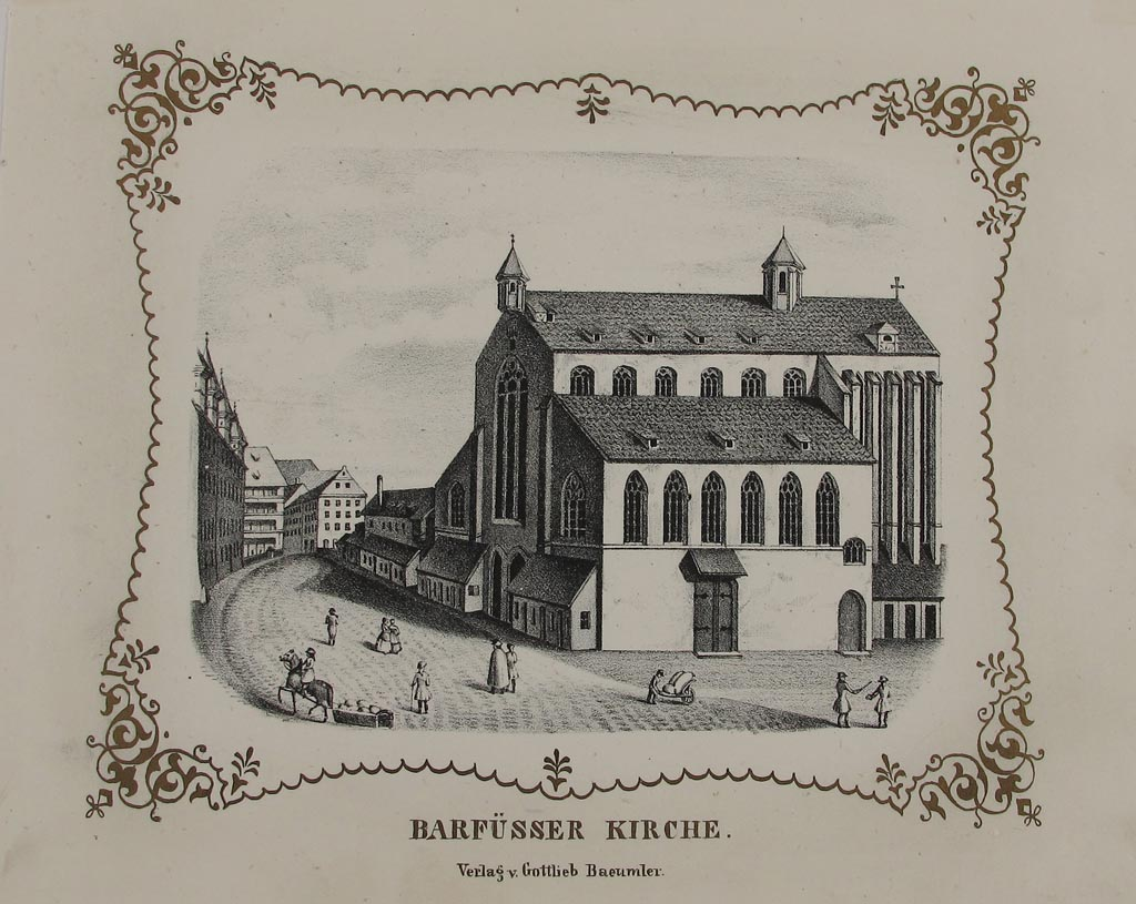 Alt-Nürnberg, Barfüßerkirche, (abgebrochen 1807) Lithographie, bei Gottlieb Bäumler, Nürnberg 1846. Ca. 14 x 17 cm